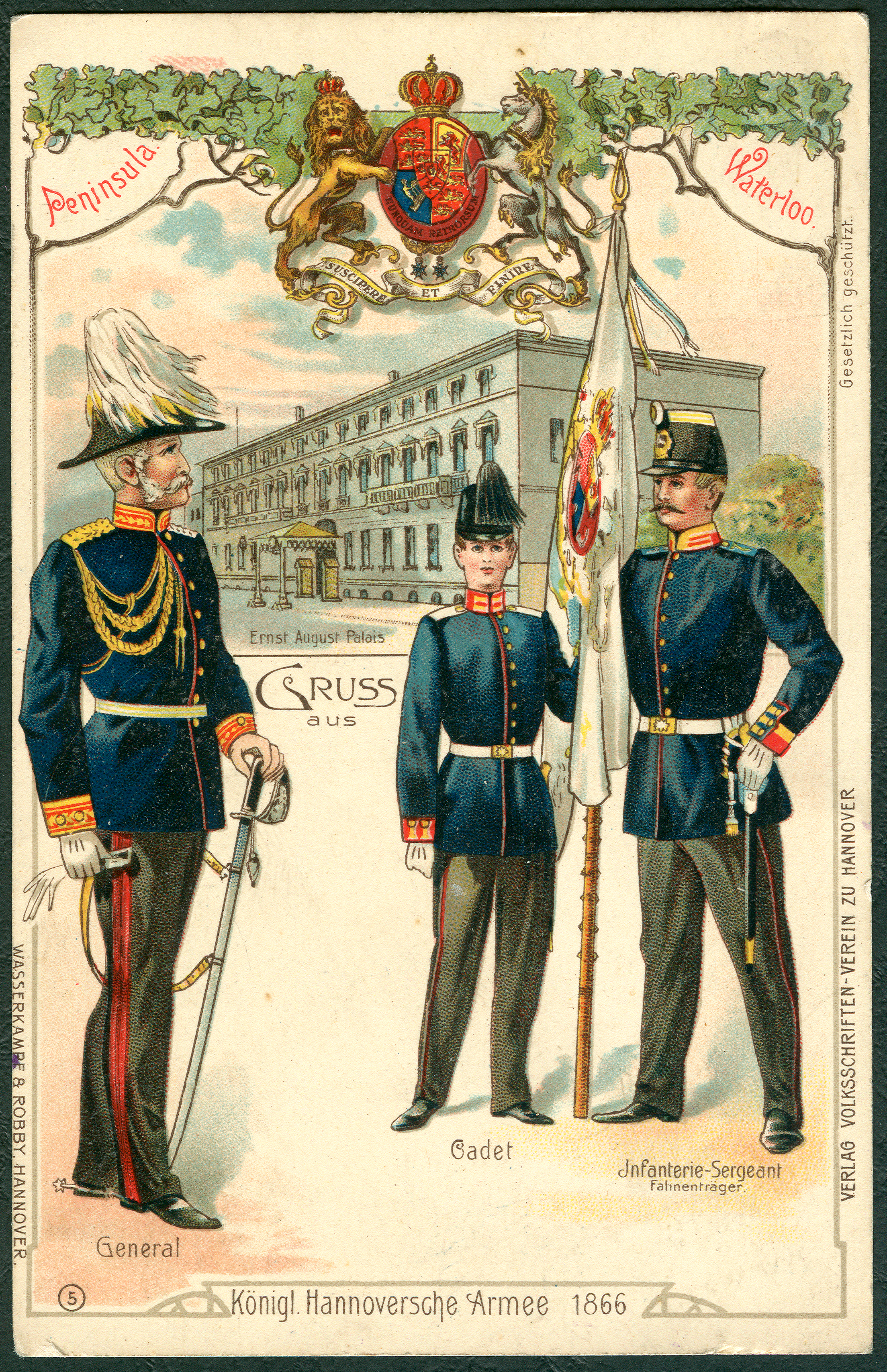 In der zwölf verschiedene Motive umfassenden "Gruss aus ..."-Postkarten-Serie Königlich Hannoversche Armee 1866 mit Bezug auf das nach Schlacht bei Langensalze annektierte Königreich Hannover zeigt die Nummer 5 unter dem Wappen der Welfen im Hintergrund das ehemalige Ernst-August-Palais in der Adolfstraße in Hannover, im Vordergrund drei Herren in den Uniformen der hannoverschen Armee einen General, einen Kadetten und Infanterie-Sergeanten. Die Schriftzüge an den Rändern verweisen für die vielfarbige Lithgraphie auf die Druckerei Wasserkampf & Robby sowie den "Verlag Volksschriften-Verein zu Hannover" ...